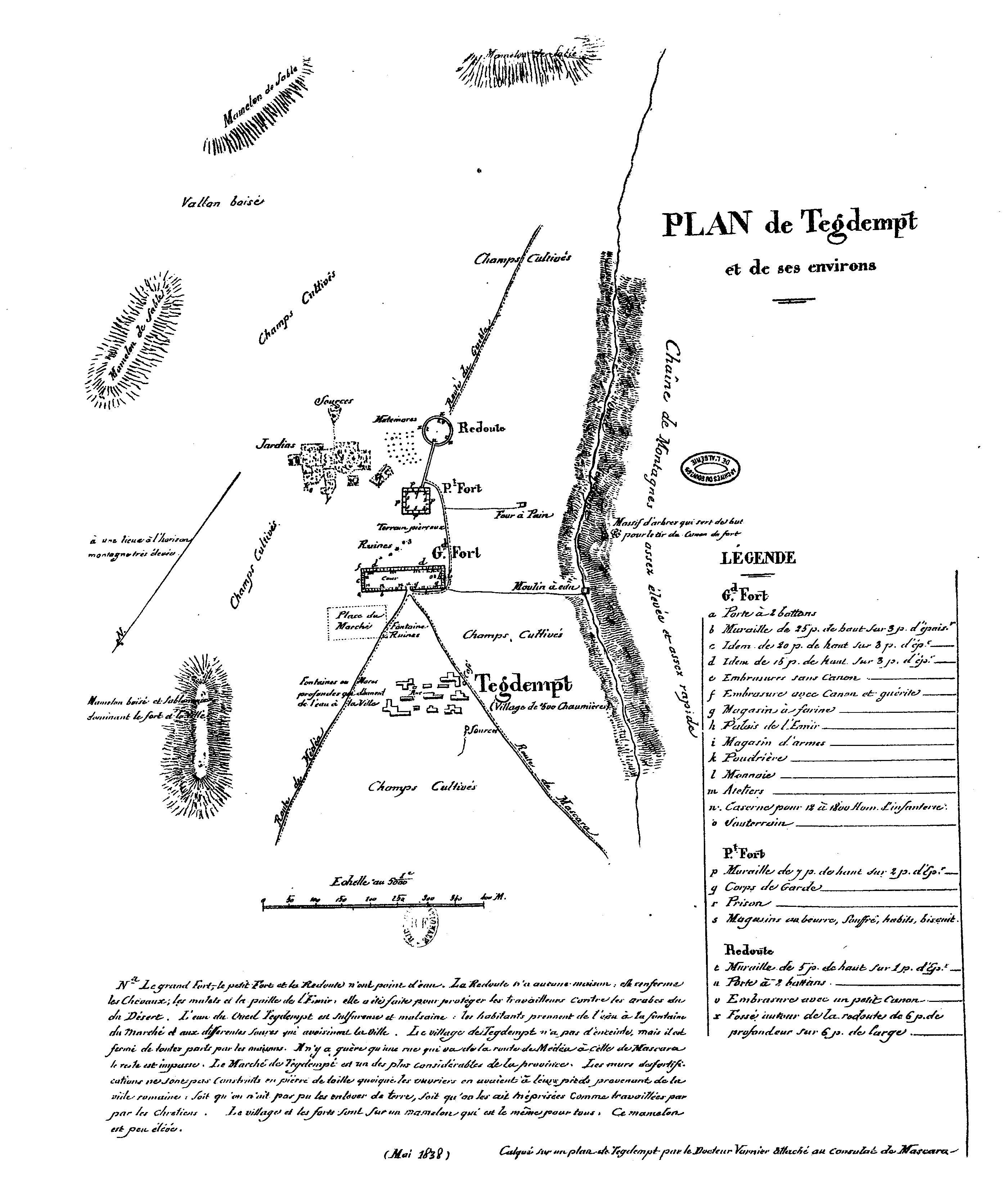 Tagdempt, Algérie, en 1838. Relevé sommaire des environs de Tagdemt et des fortifications édifiées par l'émir Abd-el-Kader, dans le cadre de la seconde ligne de défense de son état, effectué par le docteur Varnier, attaché auprès du consulat français à Mascara, en 1838.